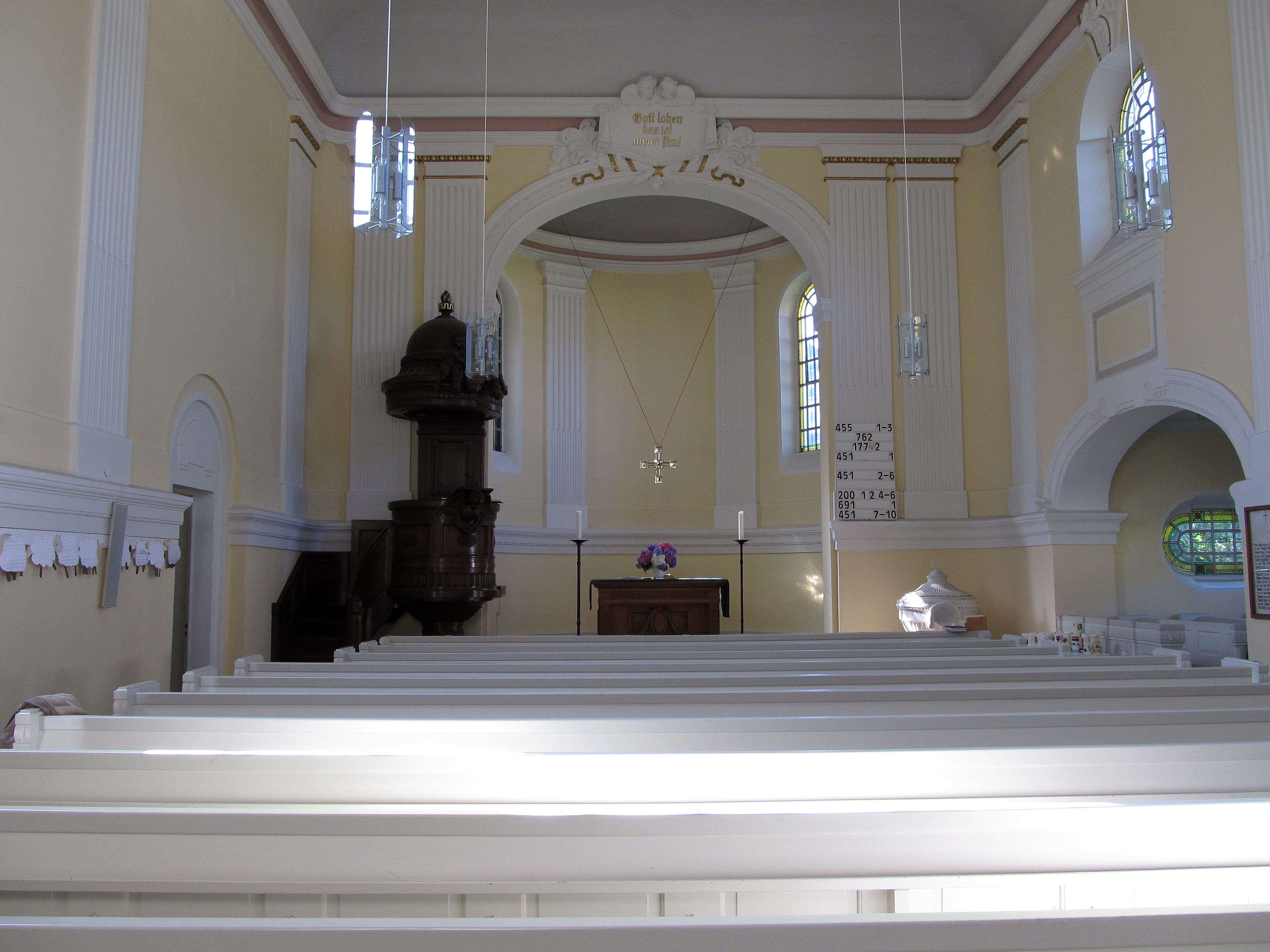 Blick ins Innere der protestantischen Kirche in Blieskastel, Saarland